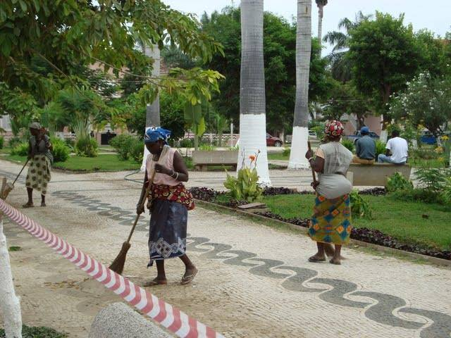 cidade mais limpa